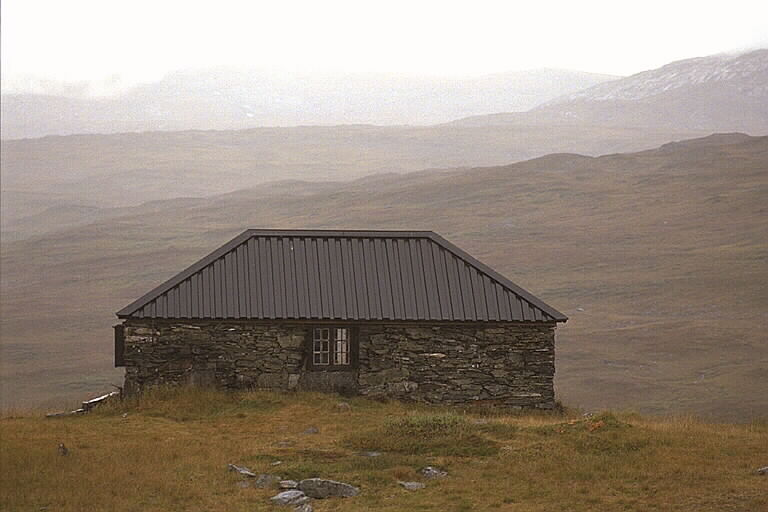 Kapellet från norr. Laponia Motiv: Jokkmokk, Alkavare kapell Nyckelord: Riksintressen, Världsarv Kategori: (01) ExteriörerKapellet från norr. Laponia.